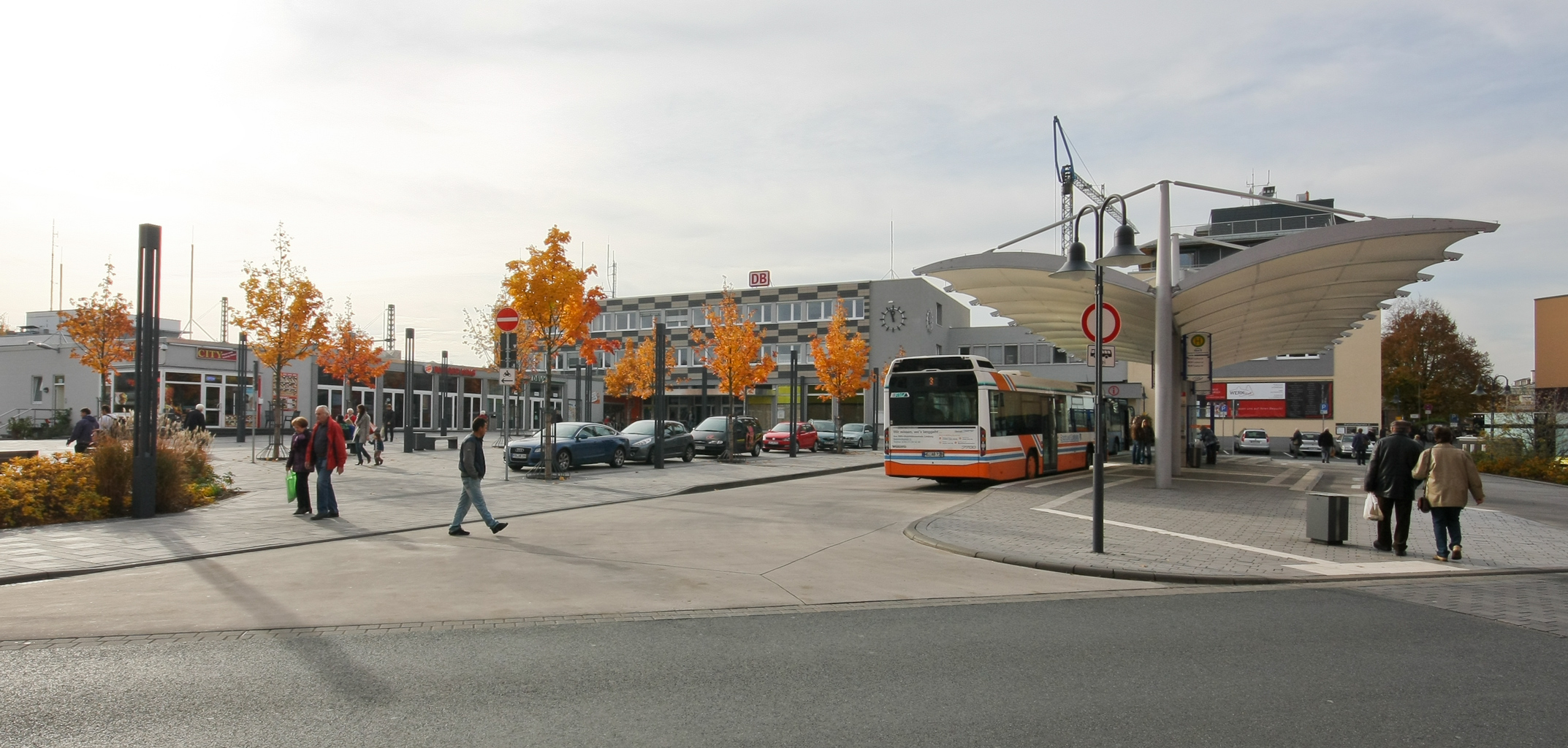 Bahnhofsvorplatz und Busbahnhof Limburg an der Lahn